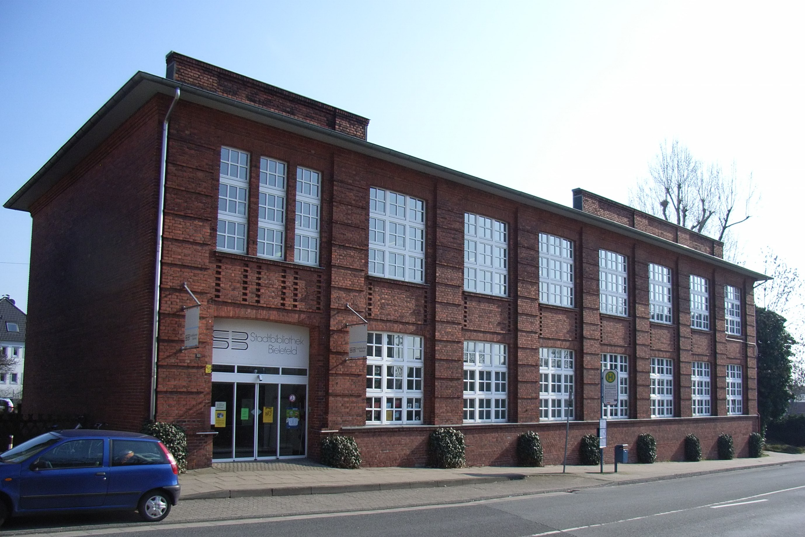 Bielefeld, Deutschland: Stadtteilbibliothek Brackwede in der Germanenstraße.